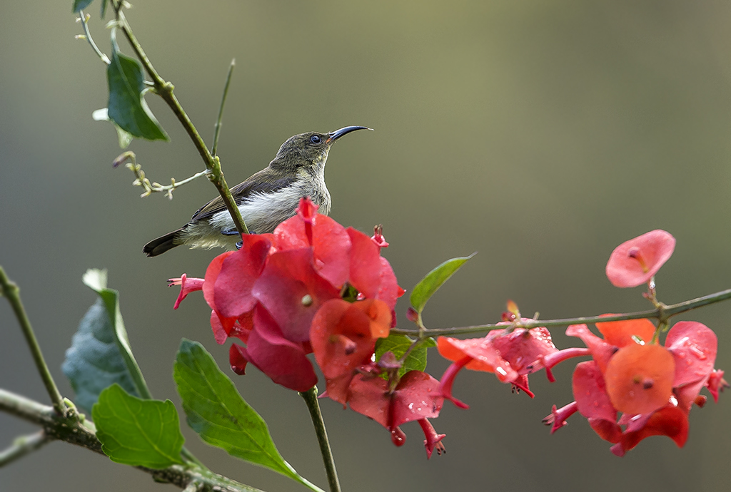 Munnar, Kerala